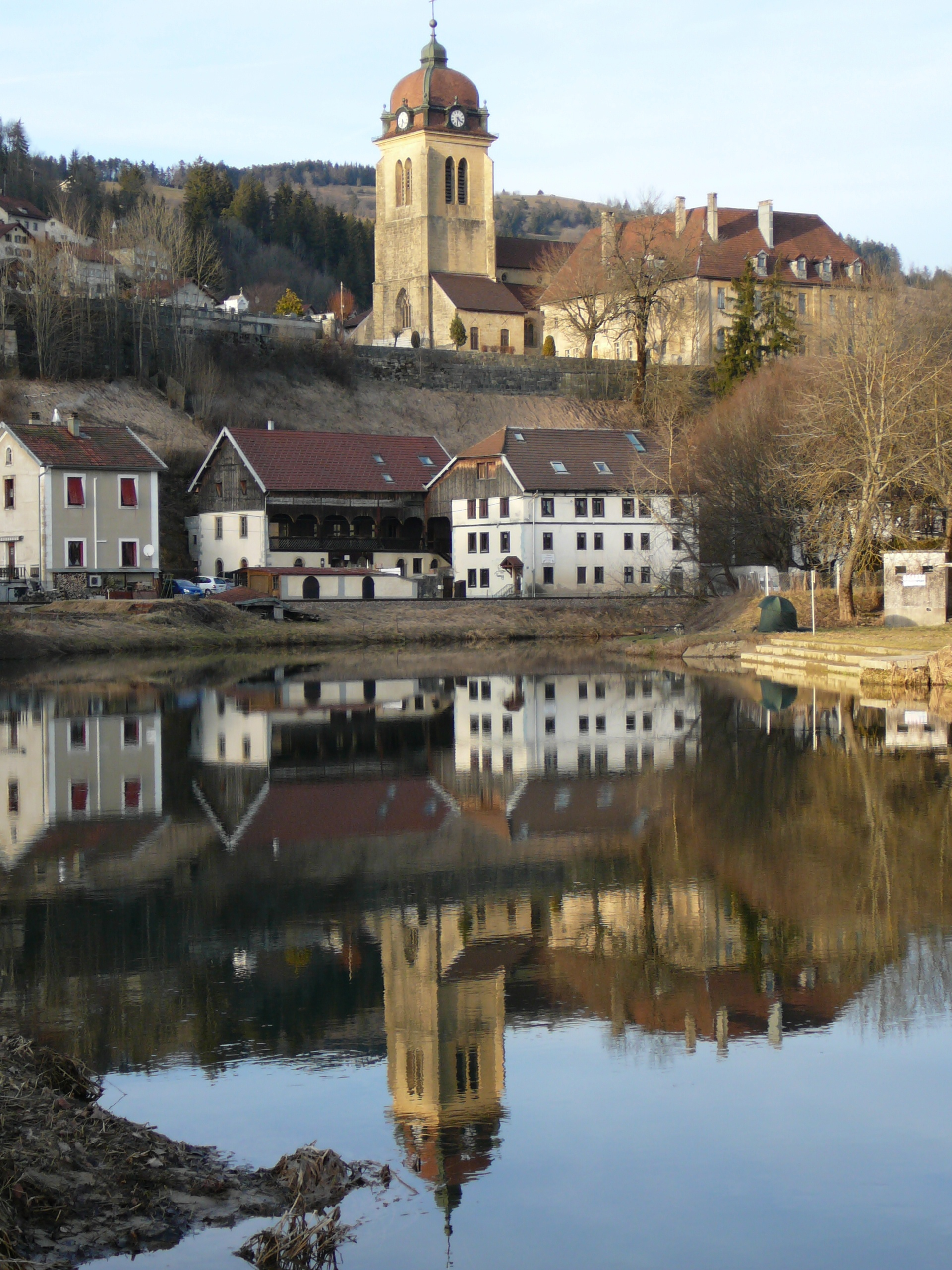 L'église Notre Dame et le Doubs à Morteau